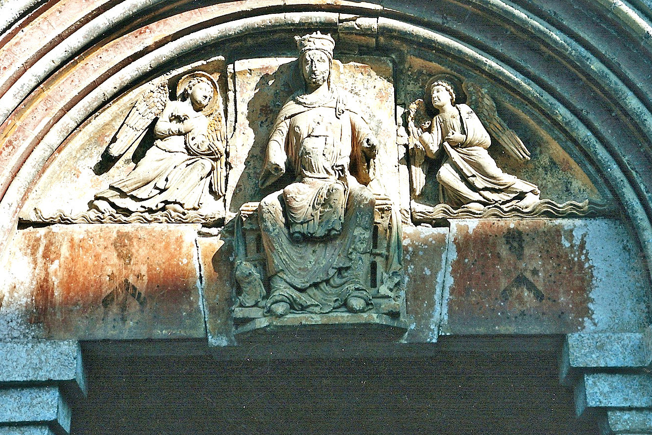 N.-D. Cunault, Tympanon, Maria mit Jesuskind